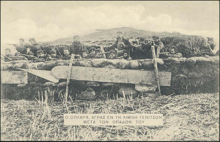 Гръцката андартска чета на капитан Никифорос (Йоанис Деместихас) и Аграс (Телос Агапинос) в Ениджевардарското езеро.